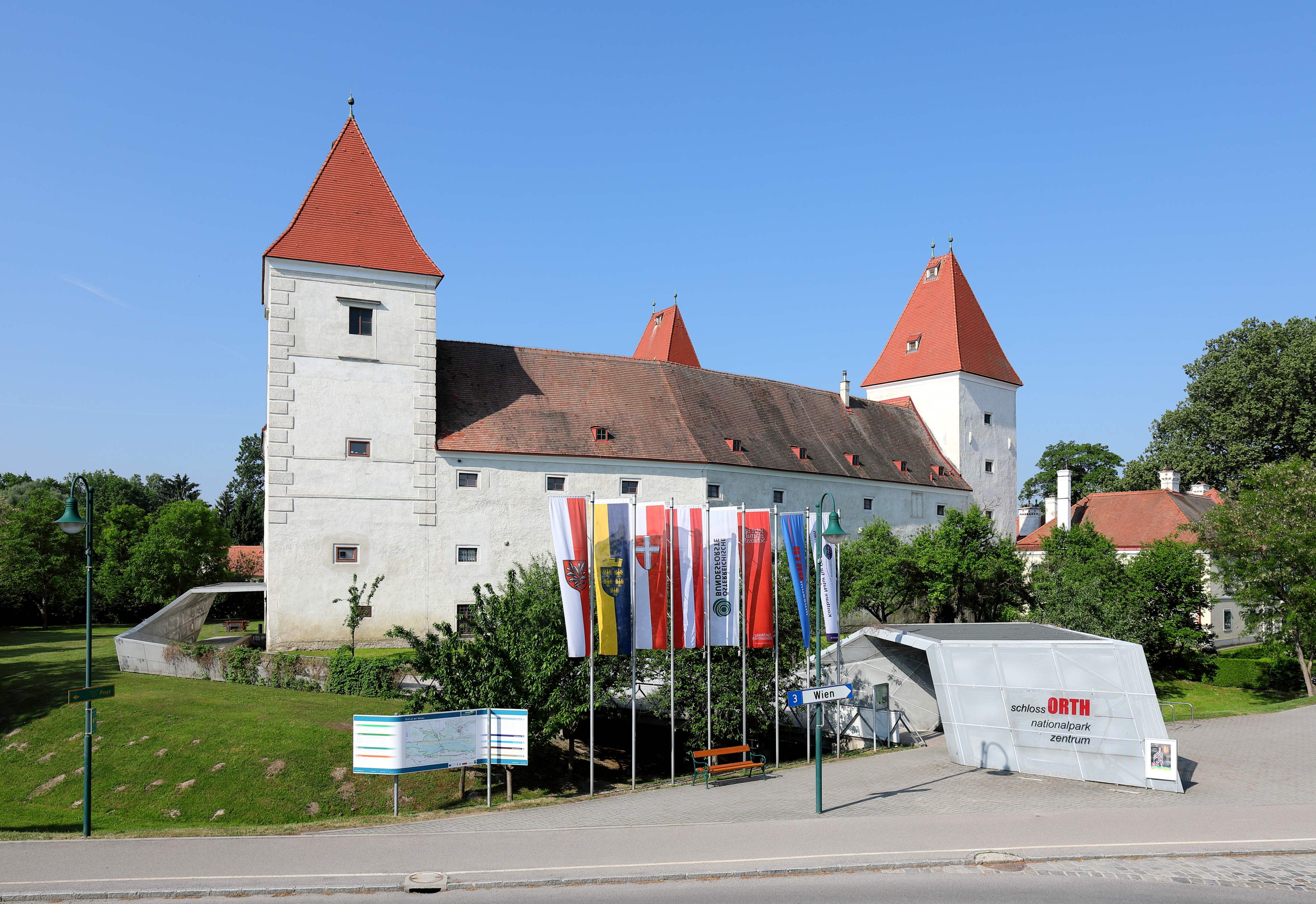 Das Schloss Orth in der niederösterreichischen Marktgemeinde Orth an der Donau, das als Besucherzentrum des Nationalparkes Donau-Auen dient. Eine mächtige dreigeschossige, dreiflügelige Anlage mit vier dominierenden Ecktürmen. Der Westtrakt stammt aus dem 12. Jahrhundert. Nach schweren Schäden durch den Ersten Österreichischen Türkenkrieg 1529 wurde die Anlage unter Beibehaltung des Grundrisses und des vorhandenen Anlagetypus 1550 wieder aufgebaut. Um 1680 erfolgte unmittelbar westseitig der Zubau des sogenannten Neuschlosses.